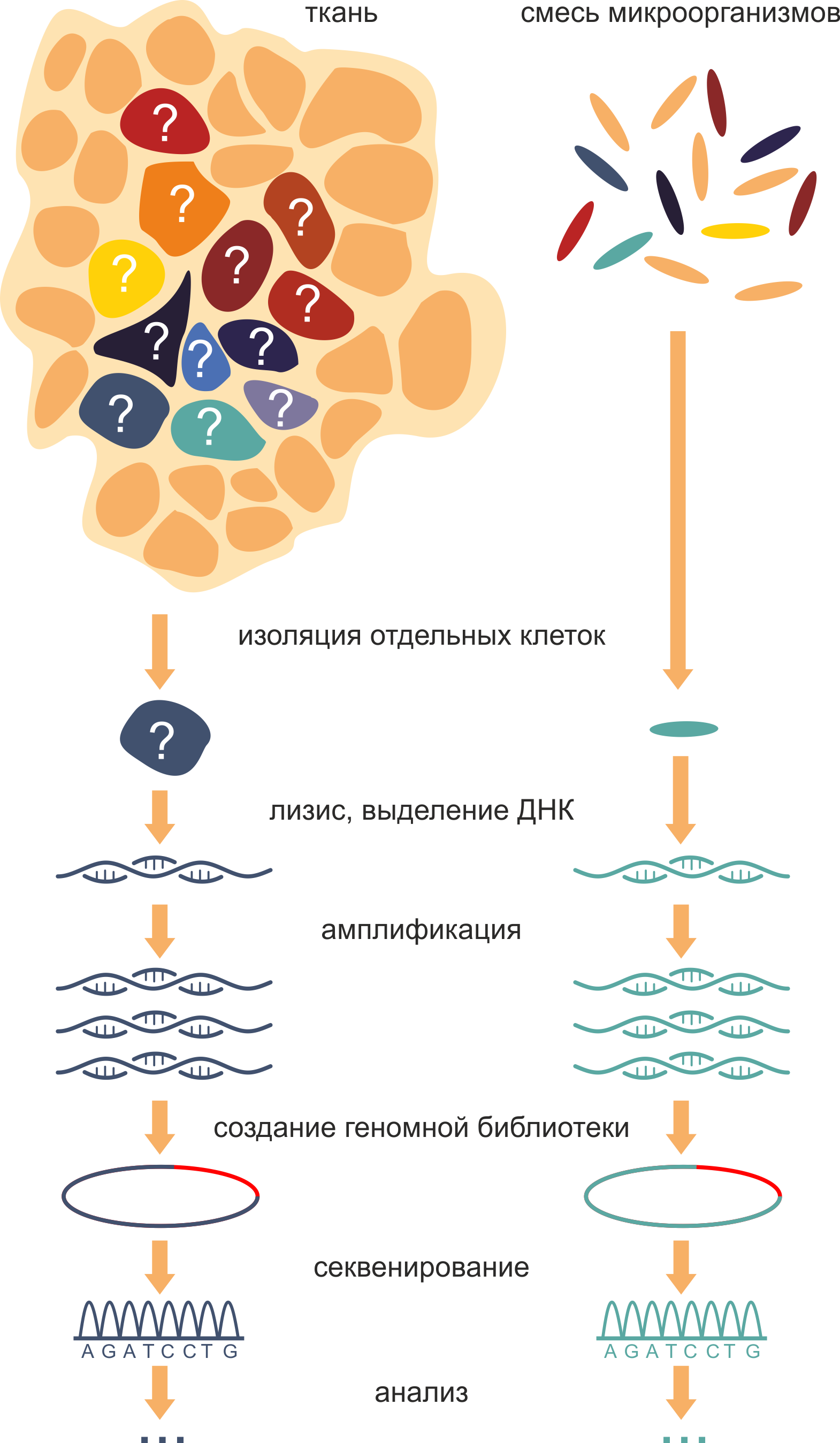 Схема эксперимента.